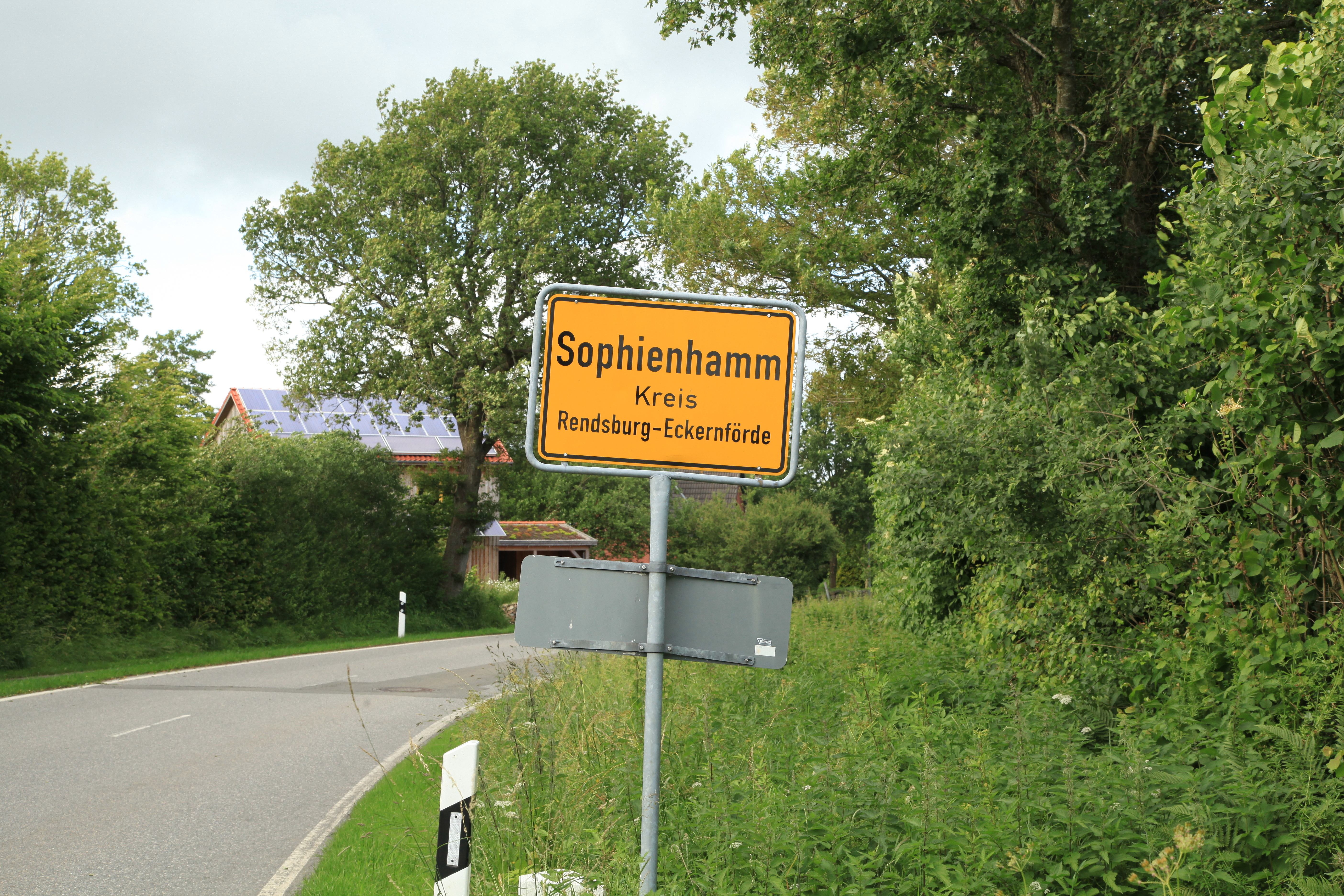 Dorfstraße in Sophienhamm